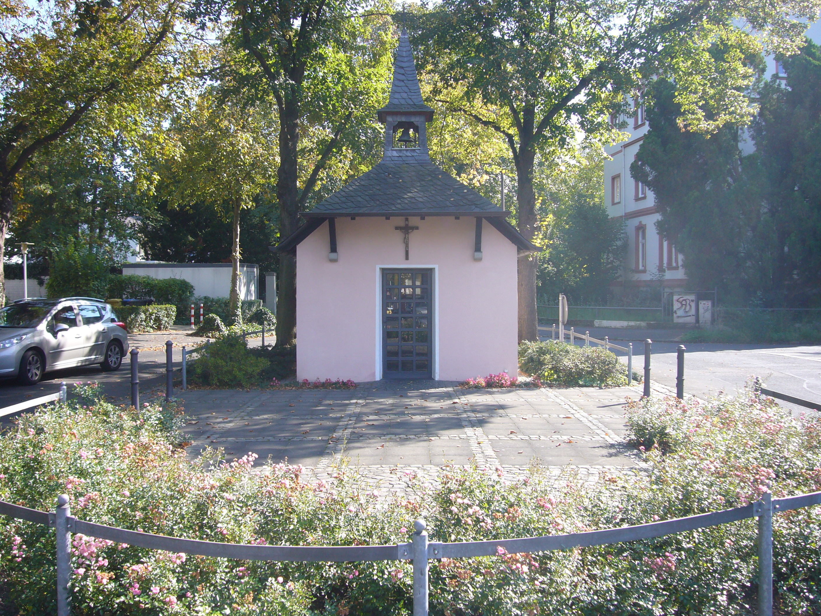 Die Marienkapelle in Rüngsdorf, Bonn-Bad Godesberg